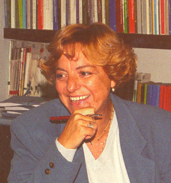 Annarita Buttafuoco, storica femminista italiana, foto eseguita a Milano nel locali dell'Unione femminile nazionale